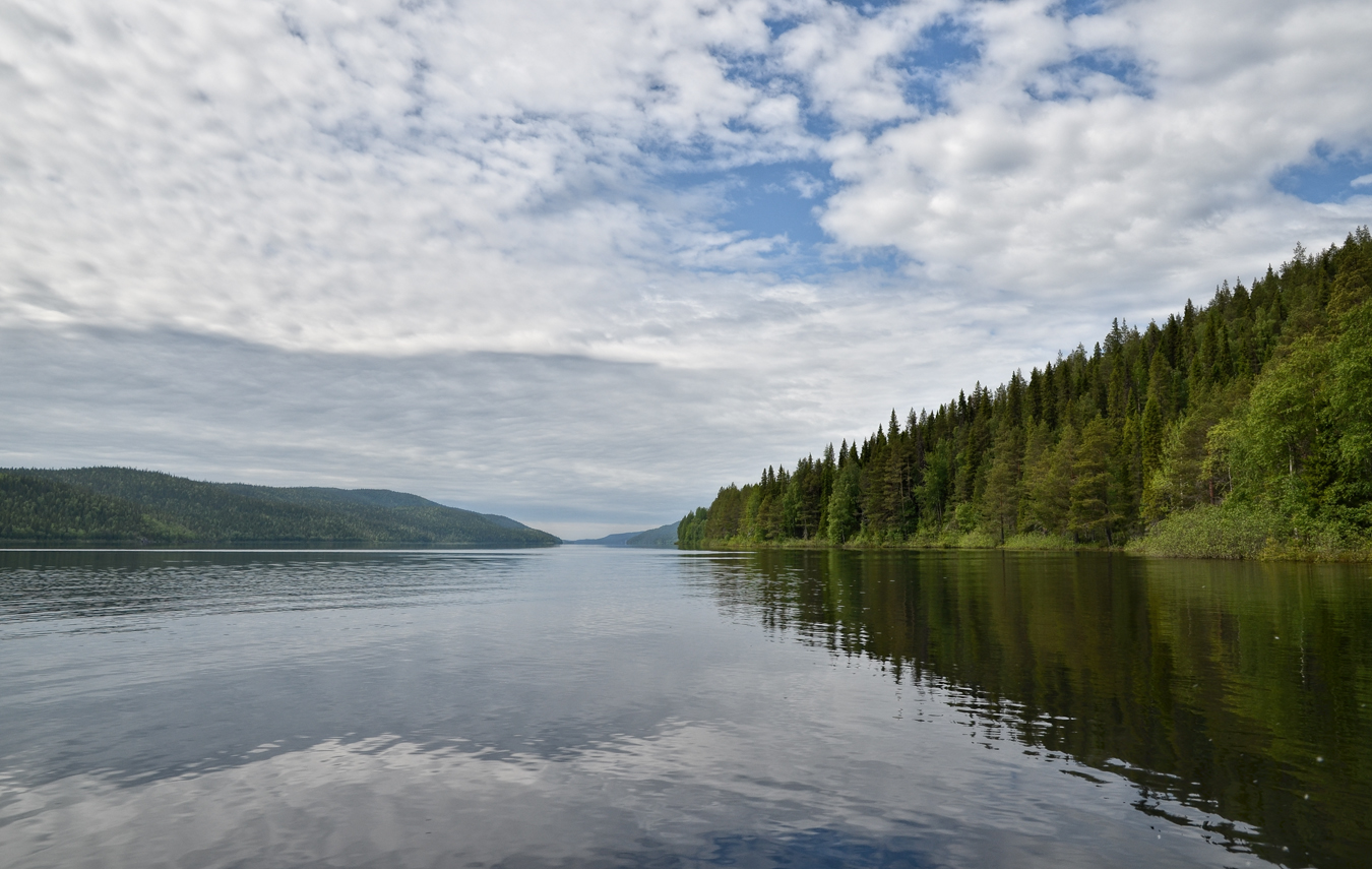 Паанаярви: Западная граница национального парка совпадает с государственной границей России с Финляндией. Со стороны финской границы к “Паанаярви” примыкает национальный парк “Оуланка”,Лоухский район, This image is related to the protected area of Russia number 1000069